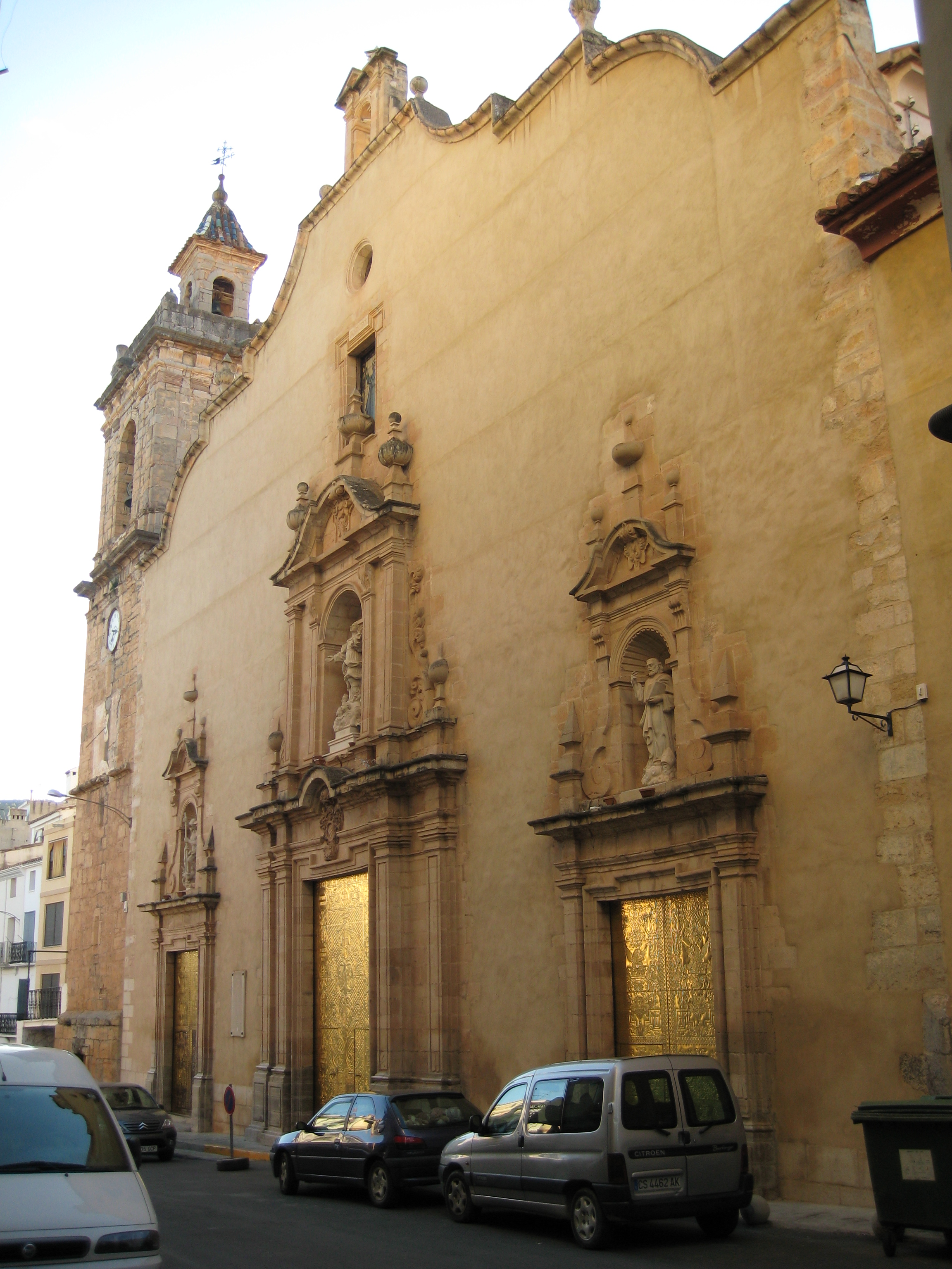 Façana de l'església de l'Assumpció de Llucena (L'Alcalatén)